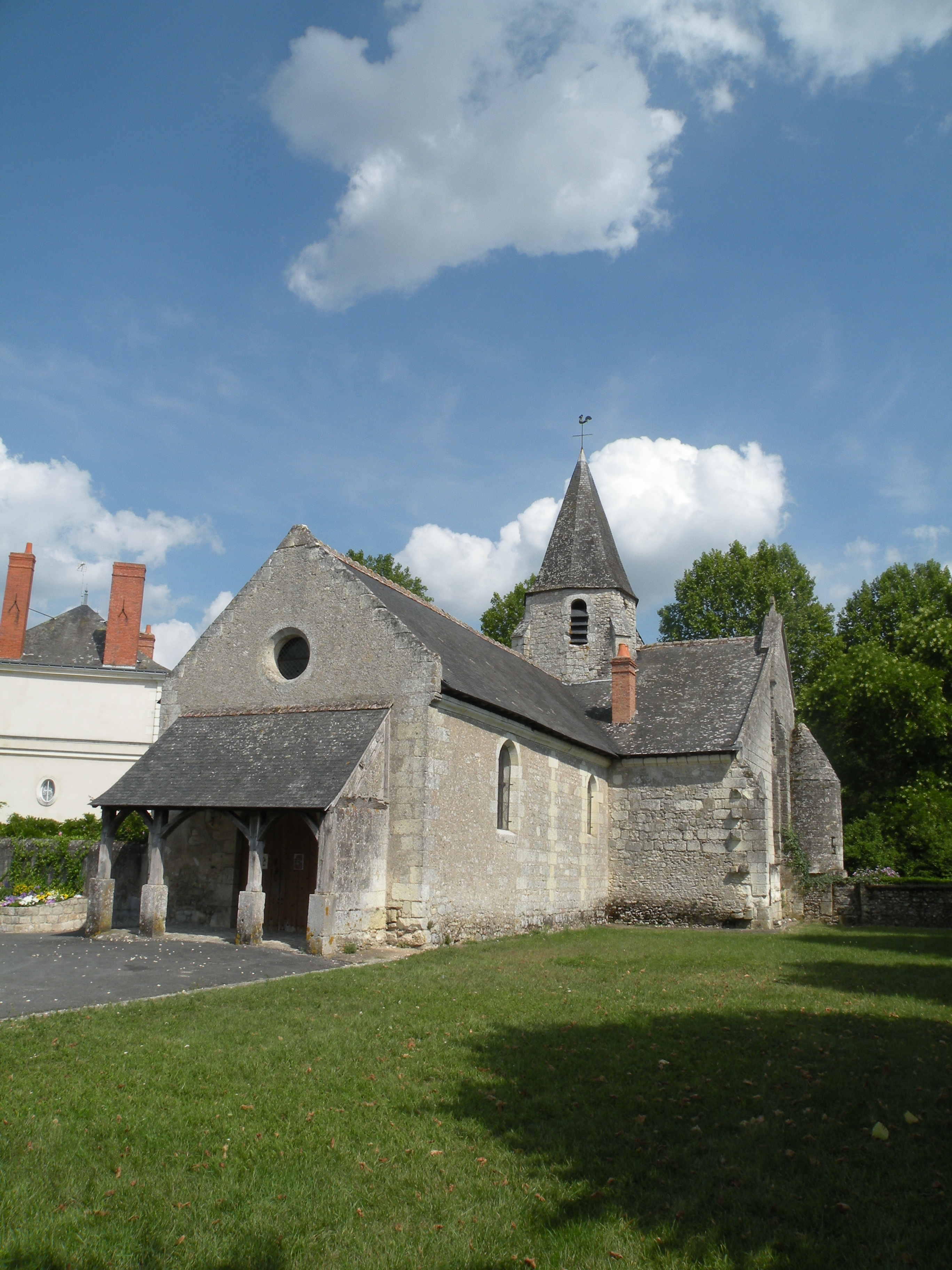 Église Saint-Quentin de La Croix-en-Touraine.